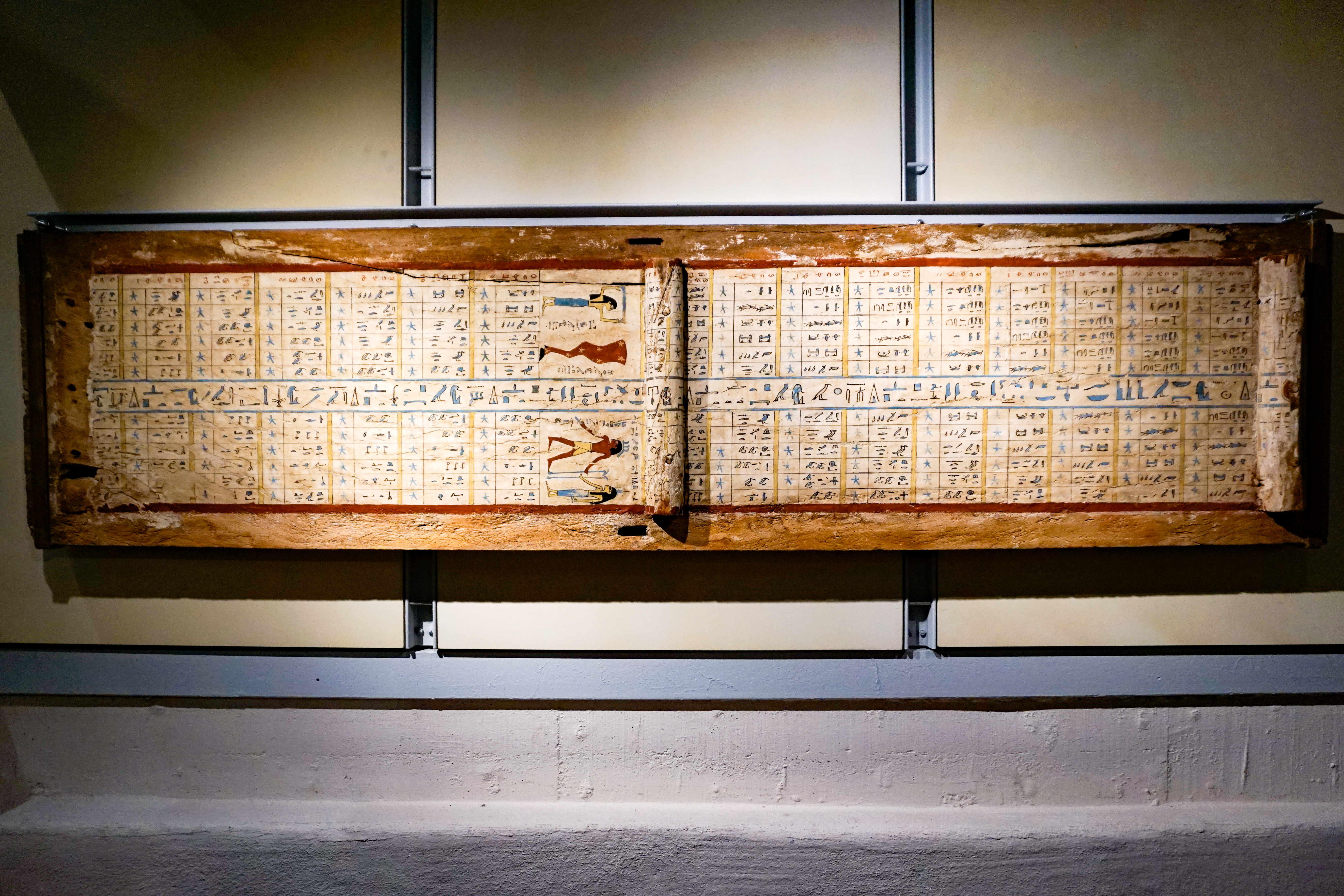 MUT: Museum der Universität Tübingen - Alte Kulturen - Sammlungen im Schloss Hohentübingen, Ägyptische Sammlungen: Sarg des Idi aus Assiut, Mitte 12. Dynastie